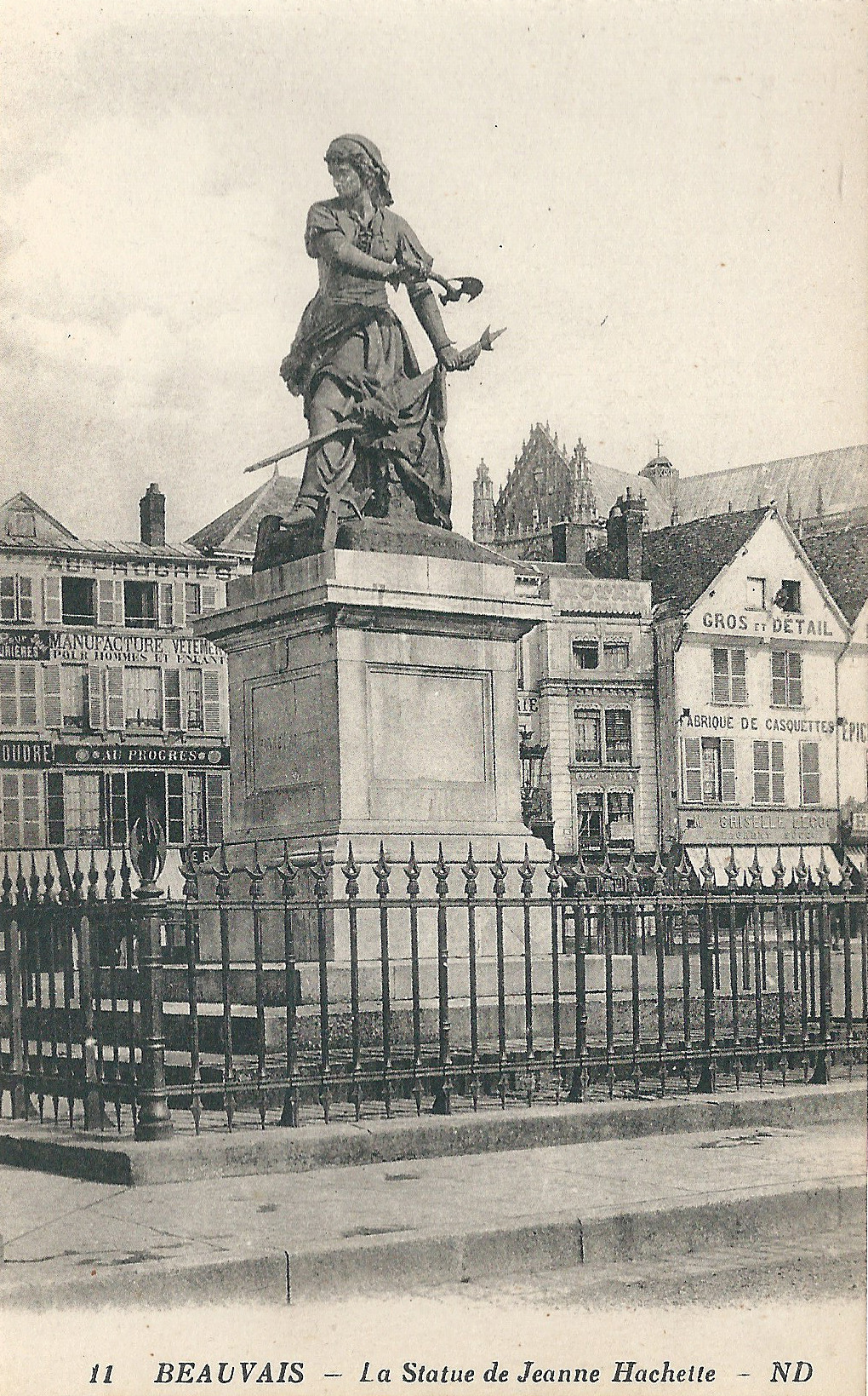 Carte postale ancienne de Beauvais (Oise, France)